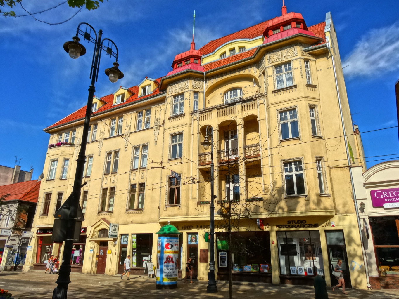 Kamienica przy ul. Gdańskiej 5 w Bydgoszczy